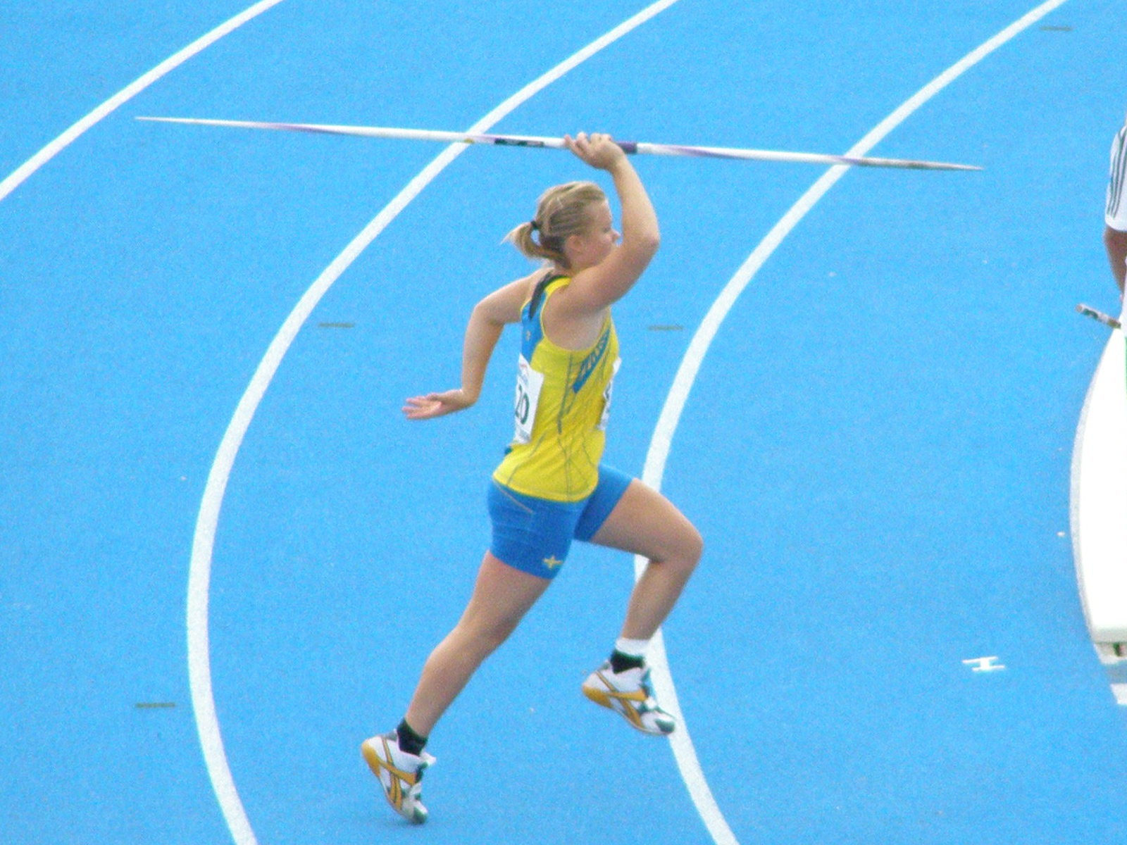 Mistrzostwa Świata Juniorów w Lekkoatletyce - Bydgoszcz 2008 - Anna Wessman - rzut oszczepem